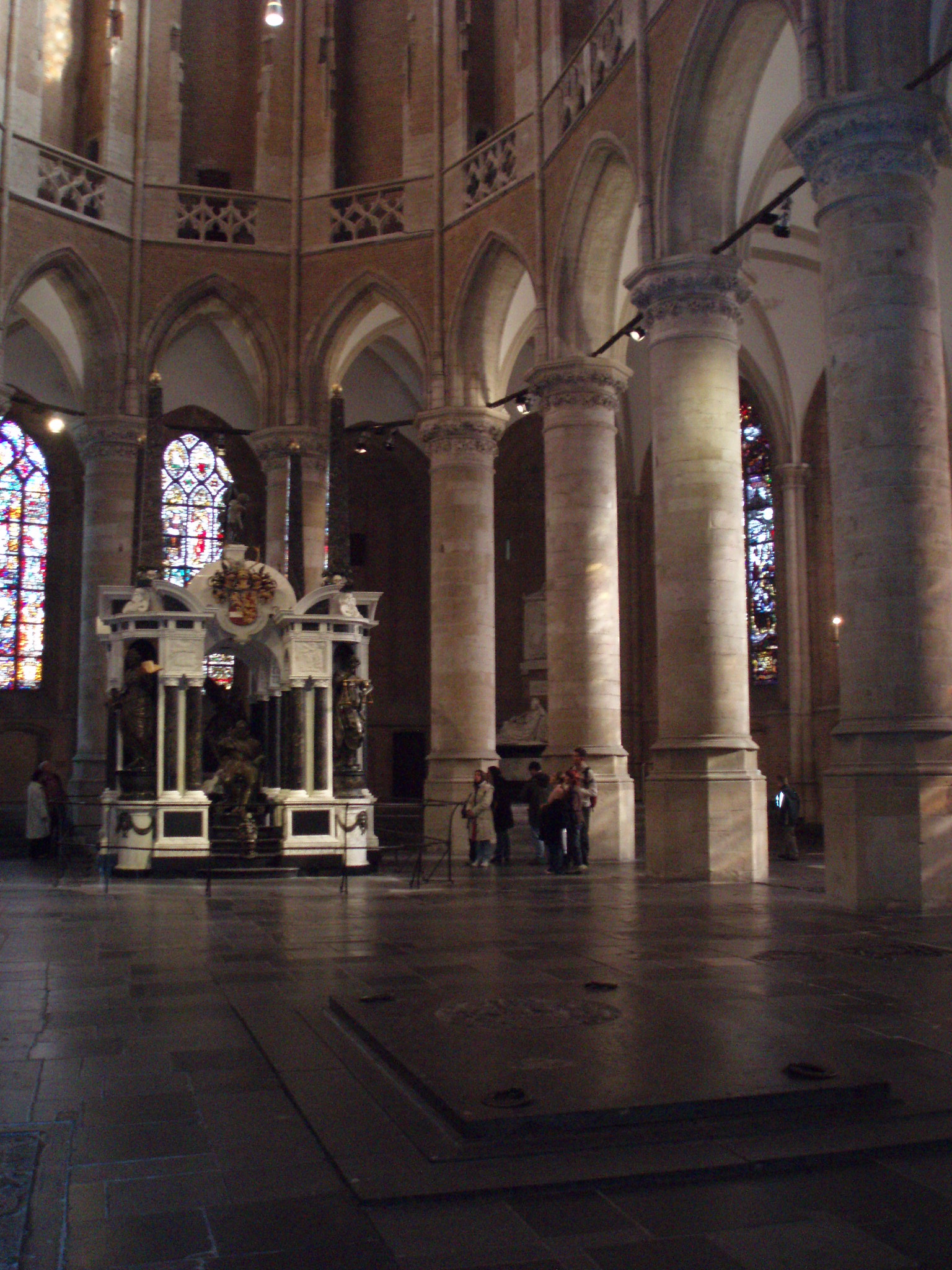 eigen foto, oktober 2006 (c) Looi